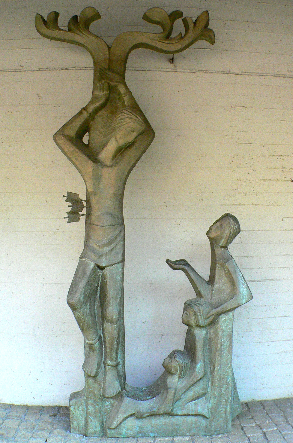 Figurengruppe des St. Godehard an der neuen Kirche in Schonungen, Ortsteil Forst, Germany, Bavaria